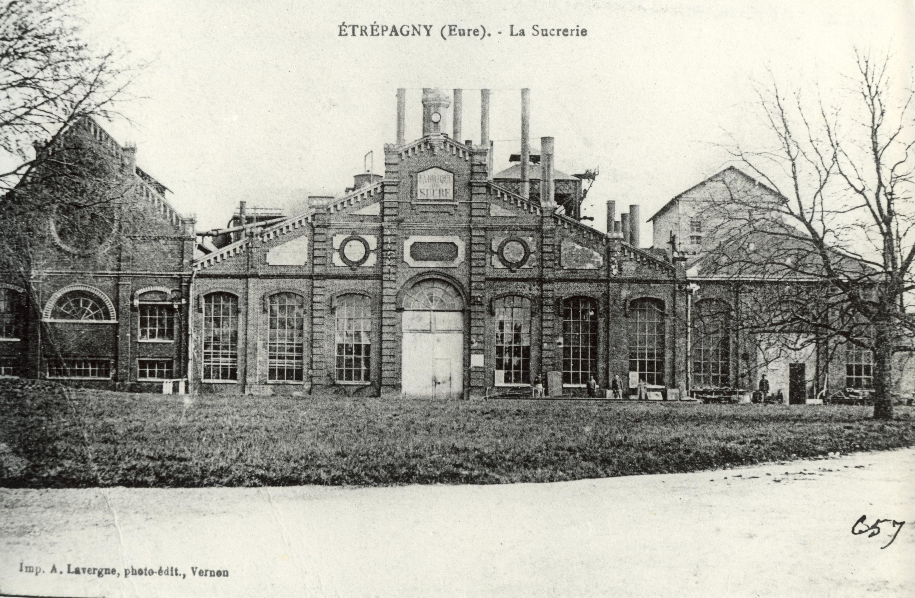 photo de la façade de la sucrerie d'Étrépagny avec les cheminées en tôle des chaudières à charbon.